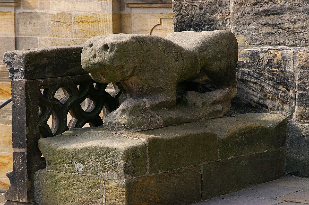 Bamberg-Dom-Domkröte